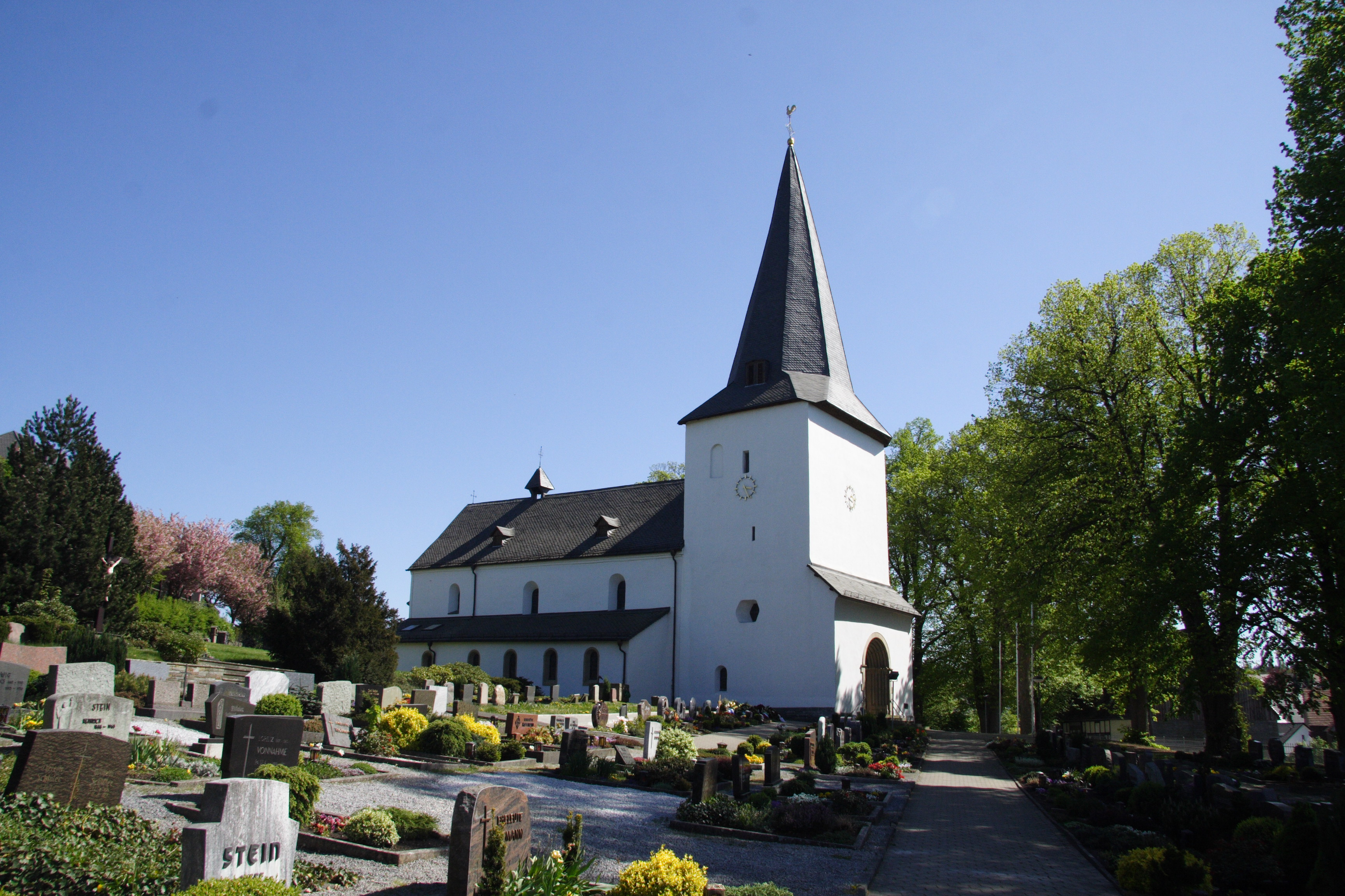 Pfarrkirche St. Dionysios in Thülen